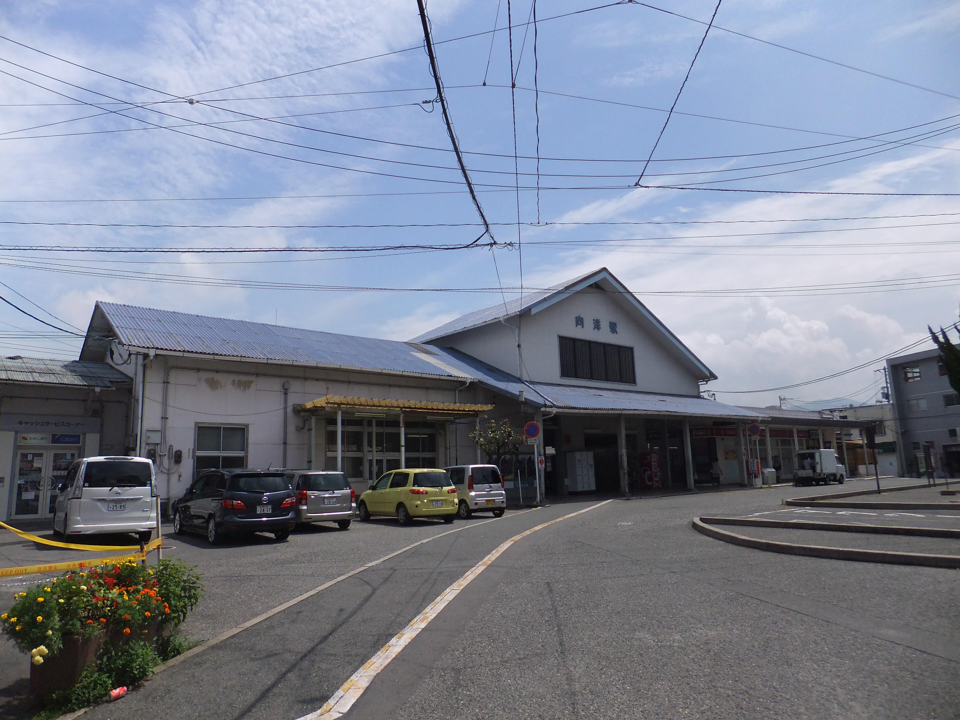 向洋駅南口